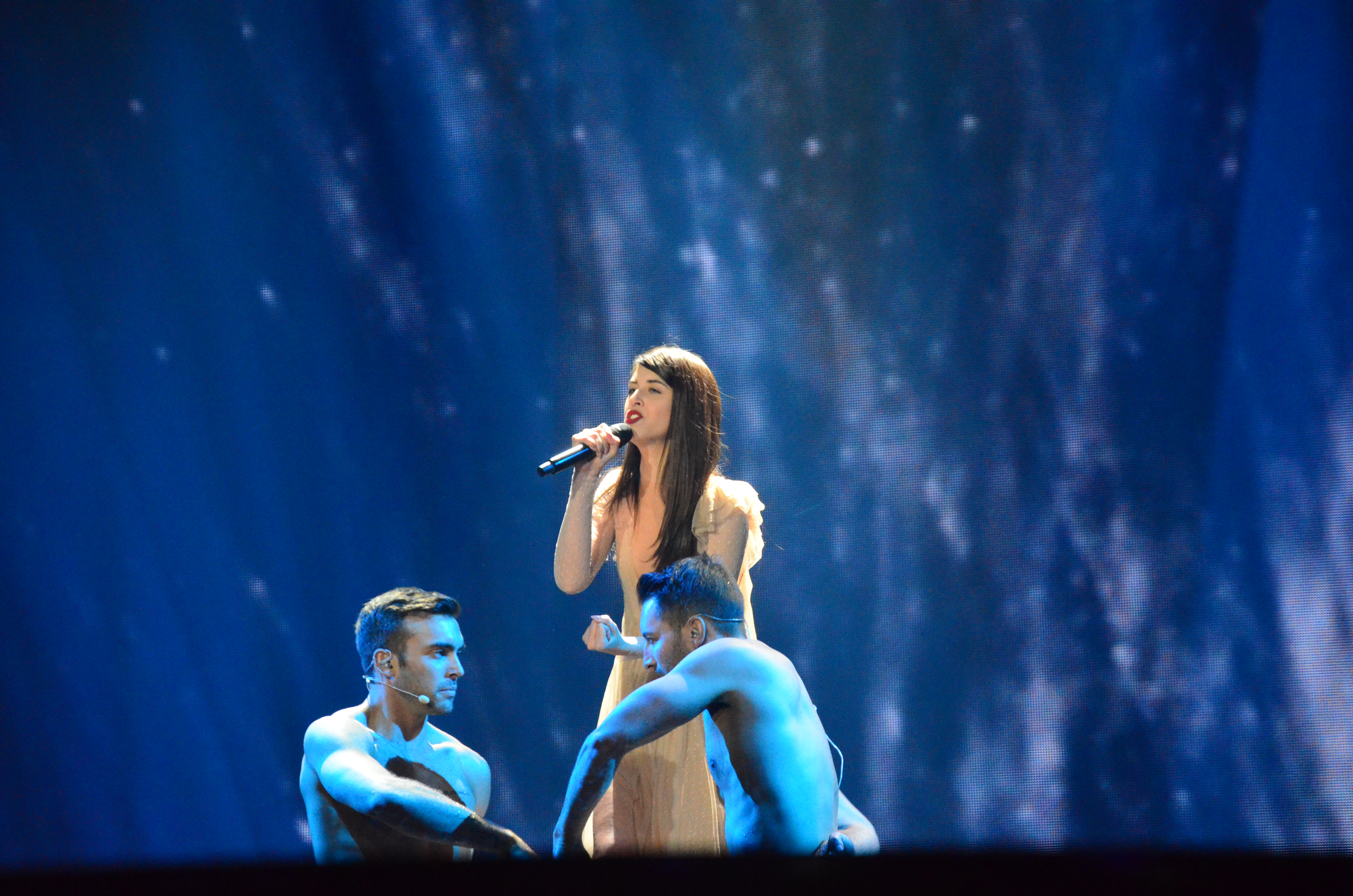 12 травня. Генеральна репетиція фіналу Євробачення 2017. Demy (Greece).